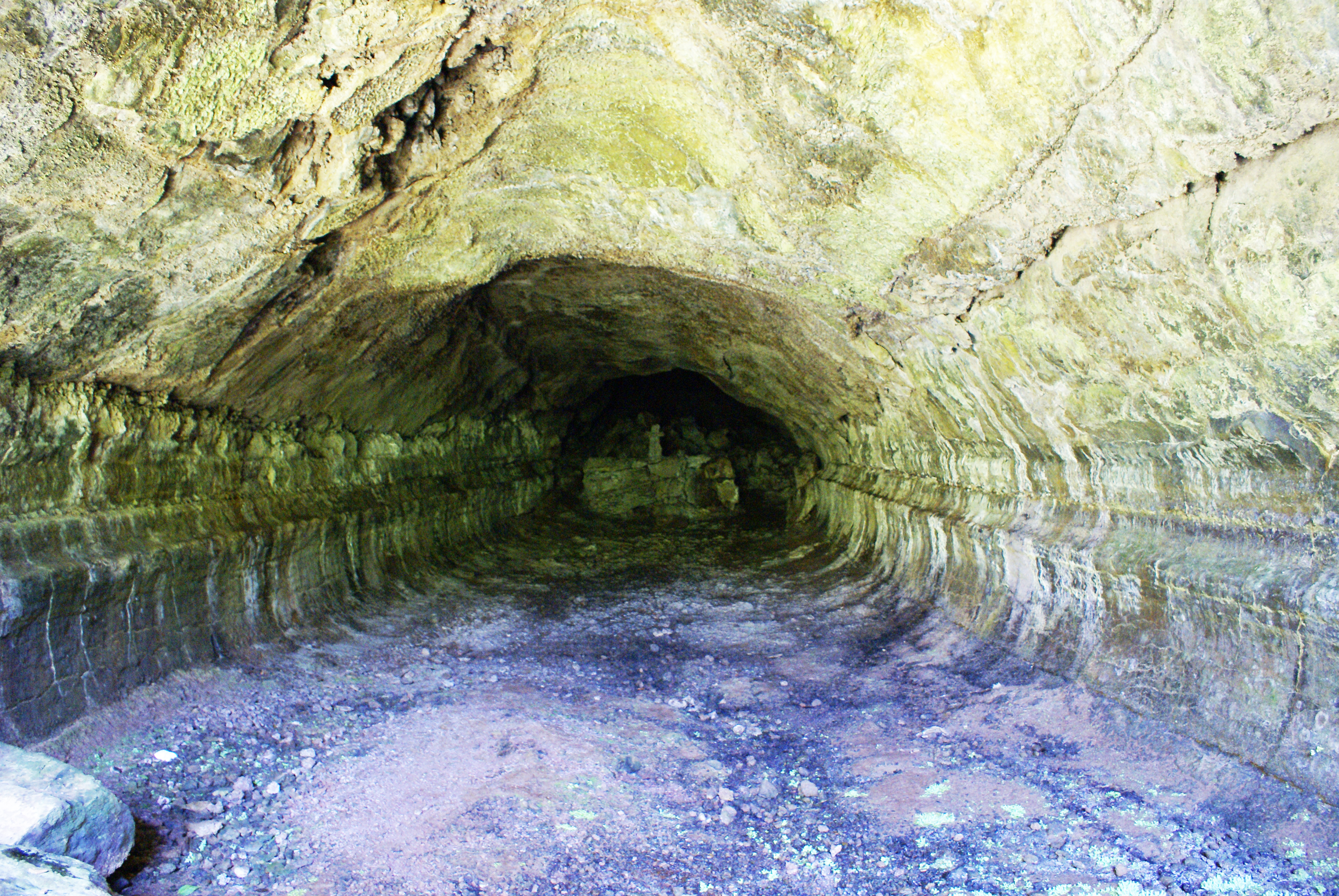 Furna do Abel, tunel principal, ilha Graciosa, Açores, Portugal